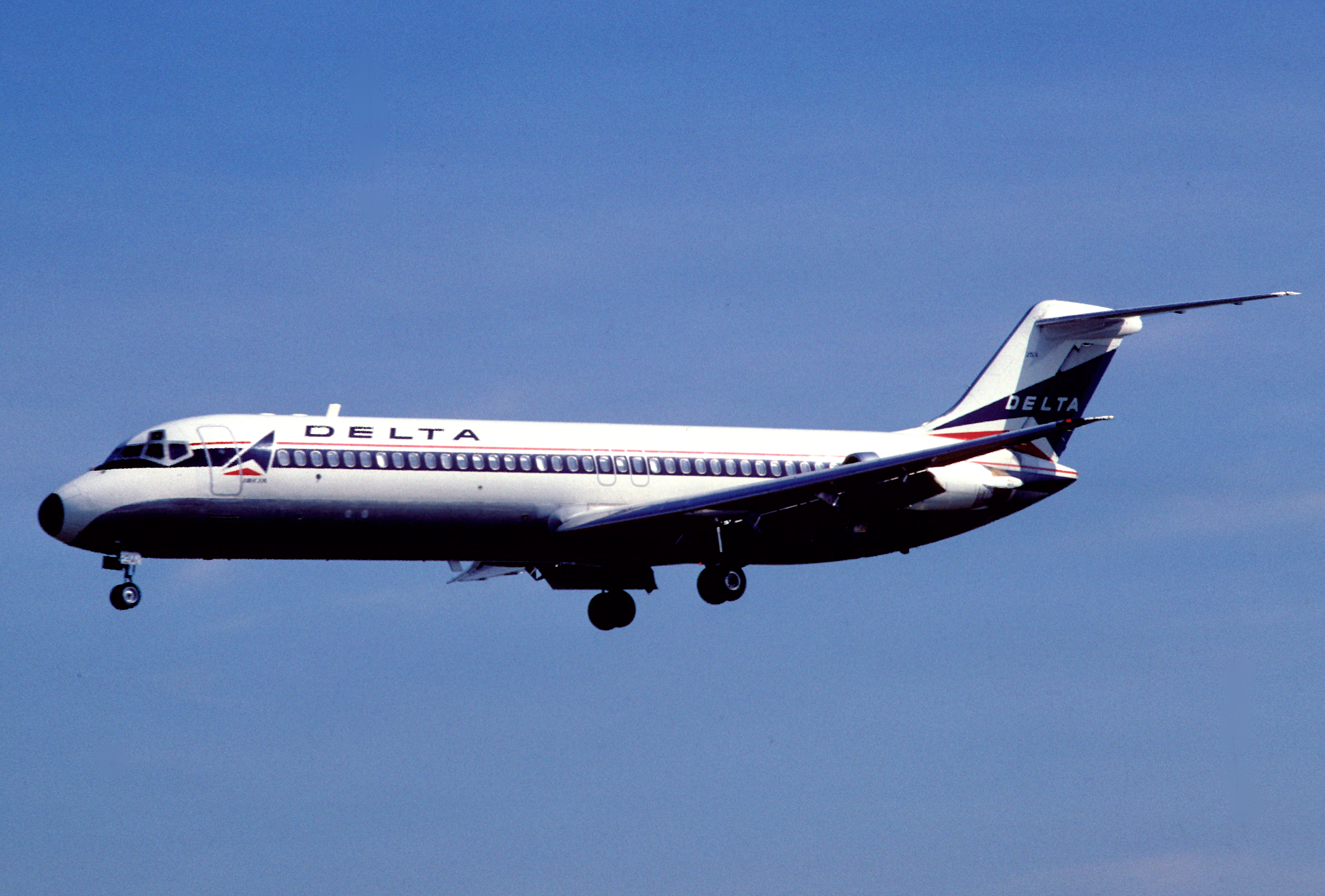 Delta Air Lines DC-9-32; N3337L, December 1980/ BCX